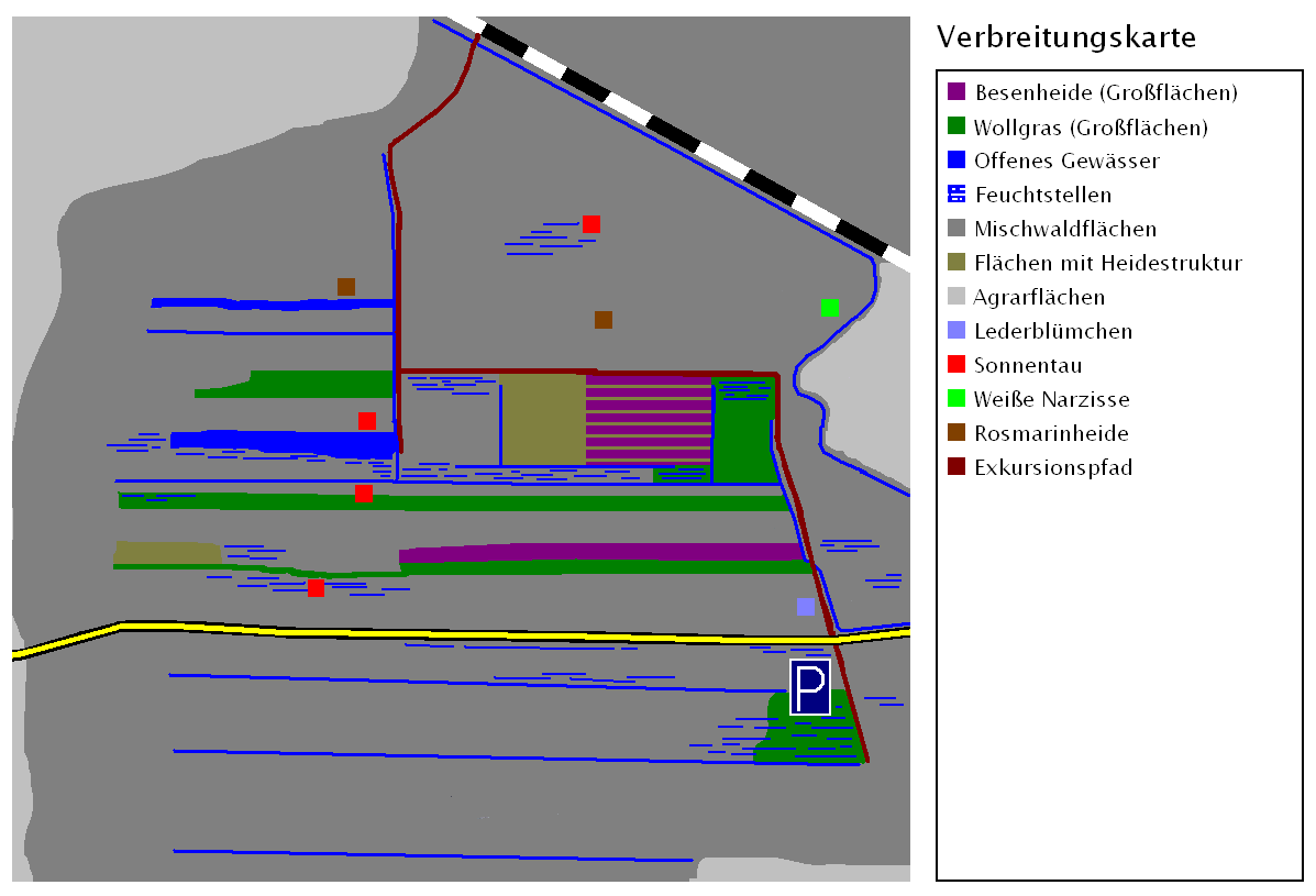 Haspelmoor, Karte des zentralen Moorbereiches andere Versionen: nein